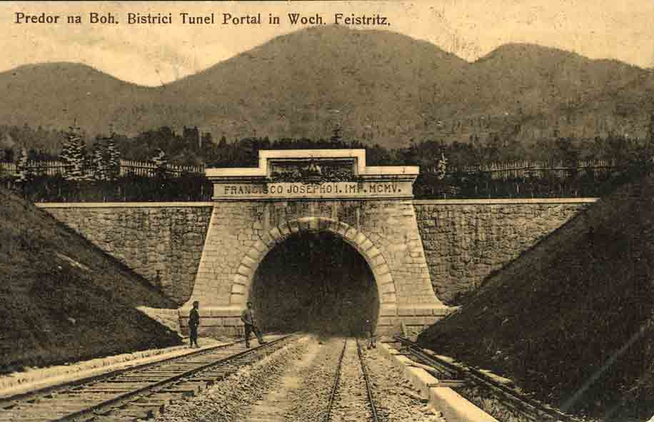 Razglednica Bohinjskega železniškega predora iz leta 1906, vir: Gorenjski muzej